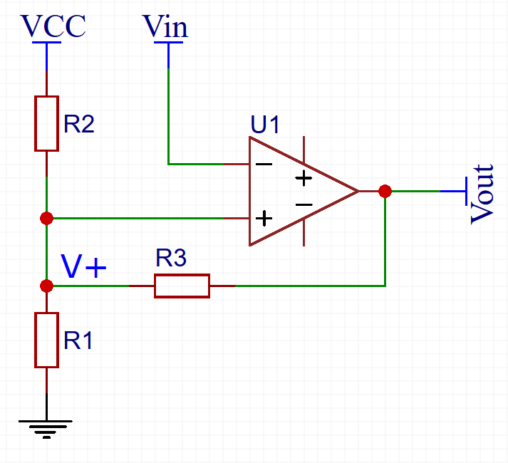 Ebasümmeetriliste lävenditega Inverteeriv Schmitt Trigger